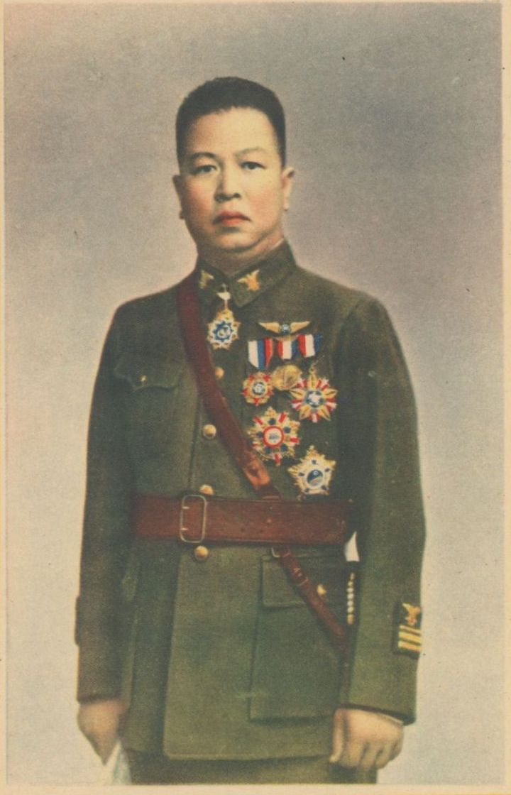 中文（中国大陆）: 中國空軍抗戰史畫插圖